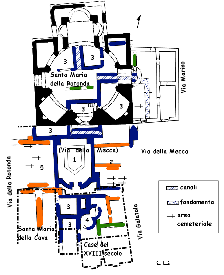 Pianta delle terme della rotonda, ricavata dal rilievo di scavo della Soprintendenza ai BB.CC.AA. di Catania. Legenda: Verde: ruderi del primitivo impianto (I-II secolo d.C.) Blu: struttura delle Terme romane di epoca antonina (monumentalizzazione del II-III secolo d.C.). grande sala absidata con vasca (frigidarium) grande sala ad ipocausto (calidarium) ambienti (vasche?) piccolo ambiente a doppio circolo ad ipocausto grande area pavimentata in opus sectile Arancio: rifacimento e riduzione delle strutture in età tardoantica Nero: ambienti della chiesa di Santa Maria della Rotonda Bianco: piccolo sagrato di fine XVIII secolo ricavato in un ambiente forse rinascimentale, oggi ingresso e area di accoglienza visitatori.